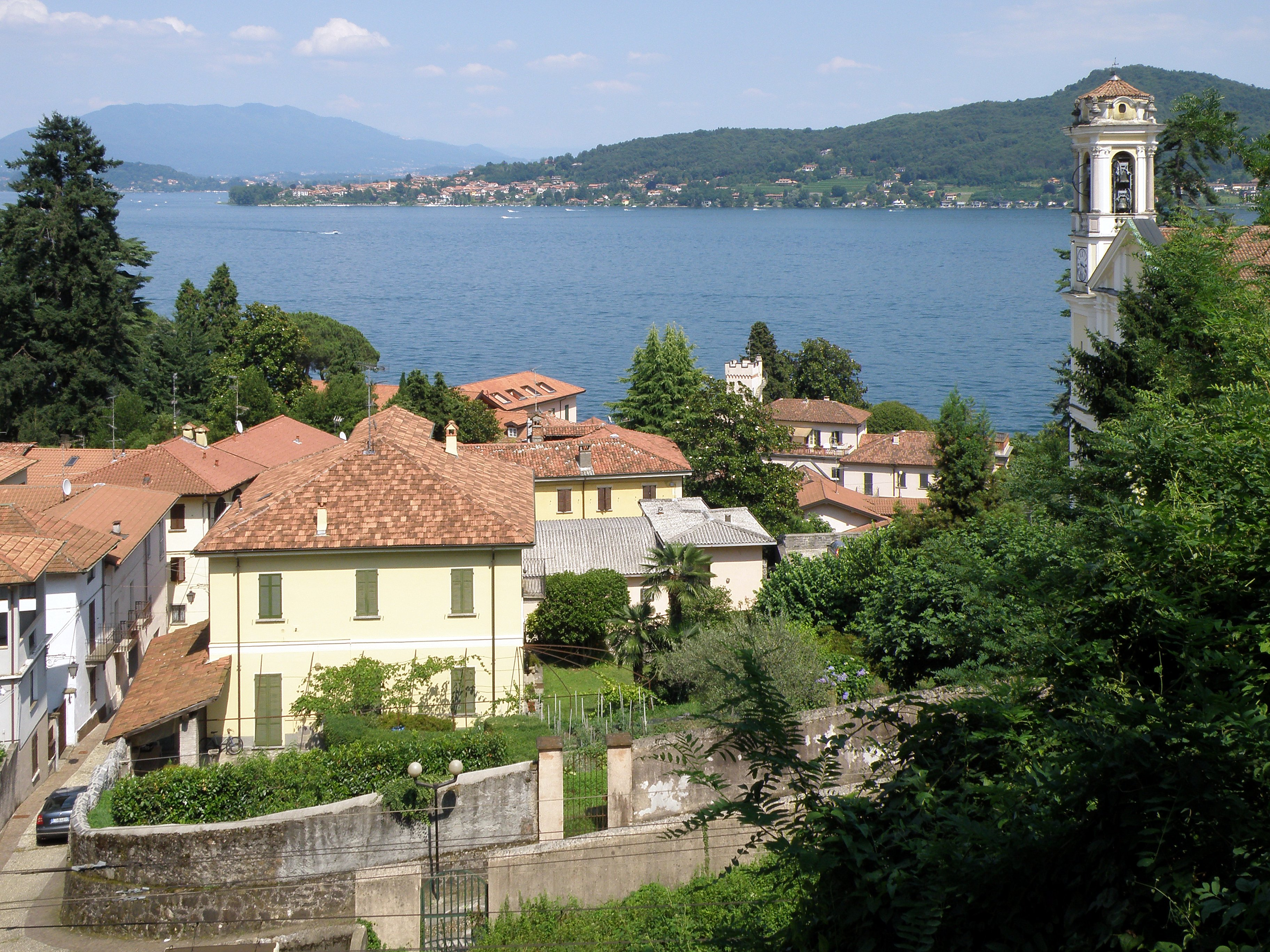 Meina (NO), sul Lago Maggiore. Veduta.